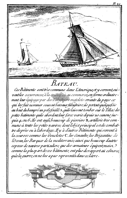 Kutter mit Stinktopf am Bugspriet